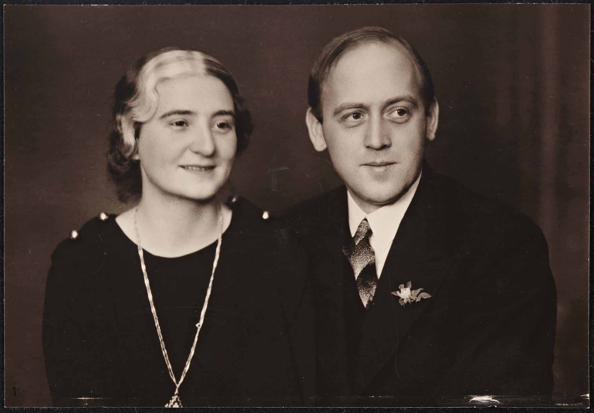 Tittel / Title: Portrett av Åse Gruda (1905-1985) og Sigmund Skard (1903-1995) Beskrivelse / Description: Åse Gruda Skard var barnepsykolog og kvinnesakskvinne. Sigmund Skard var forfatter og professor i amerikansk litteratur. Dato / Date: 1934 Fotograf / Photographer: ukjent / unknown Eier / Owner Institution: Nasjonalbiblioteket / National Library of Norway Lenke / Link: Bildesignatur / Image Number: bldsa_SKARD0867